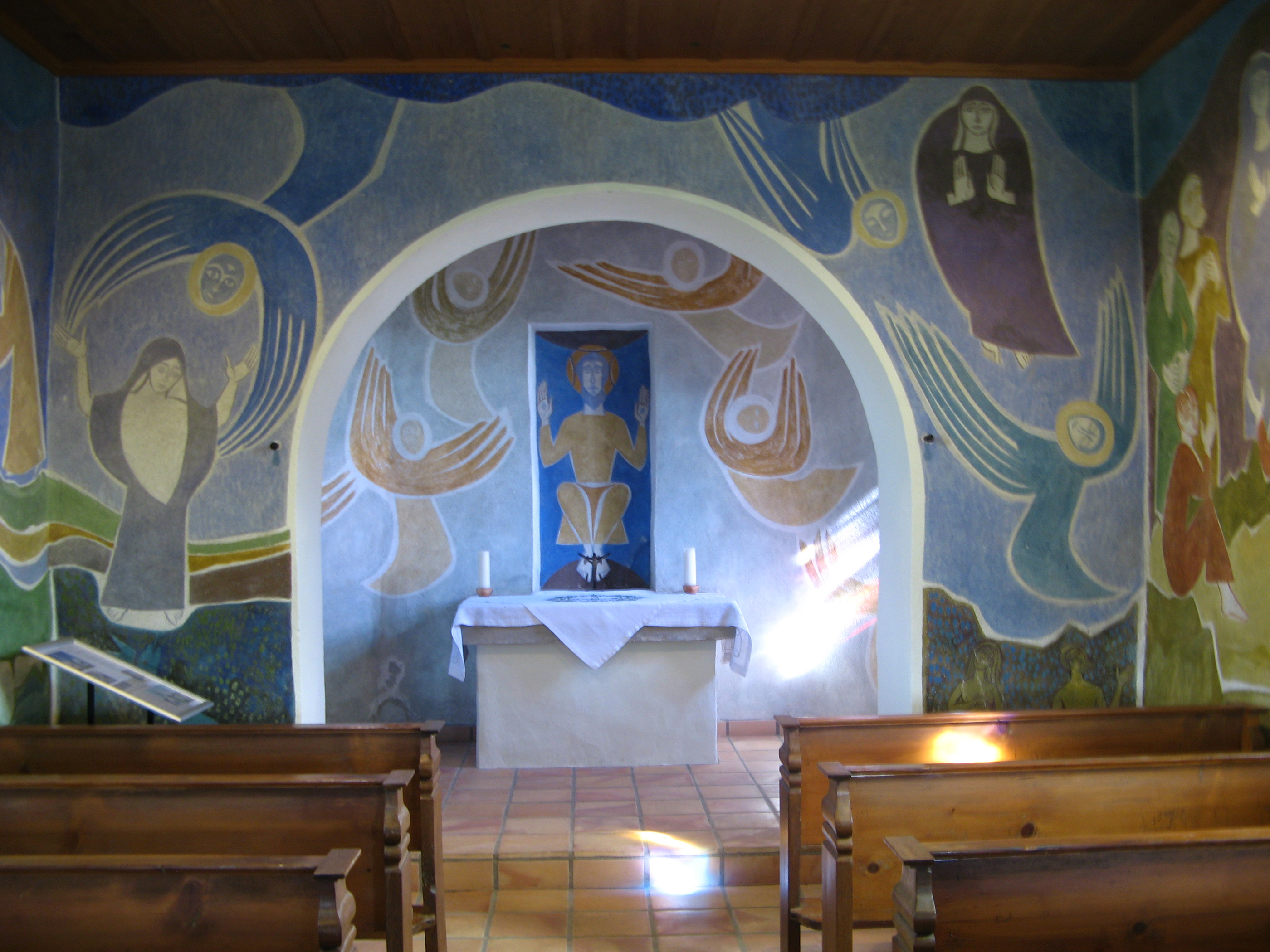 Wendelinskapelle in Hagnau bei Merenschwand, Innenansicht